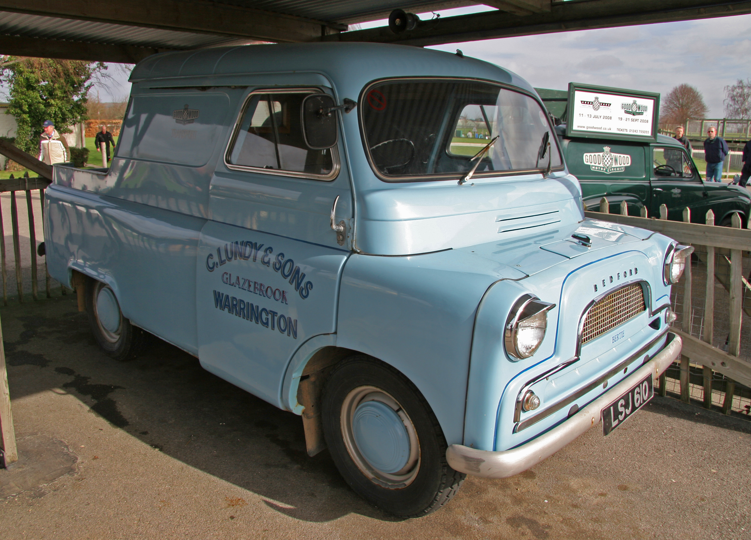 Bedford CABedford CA